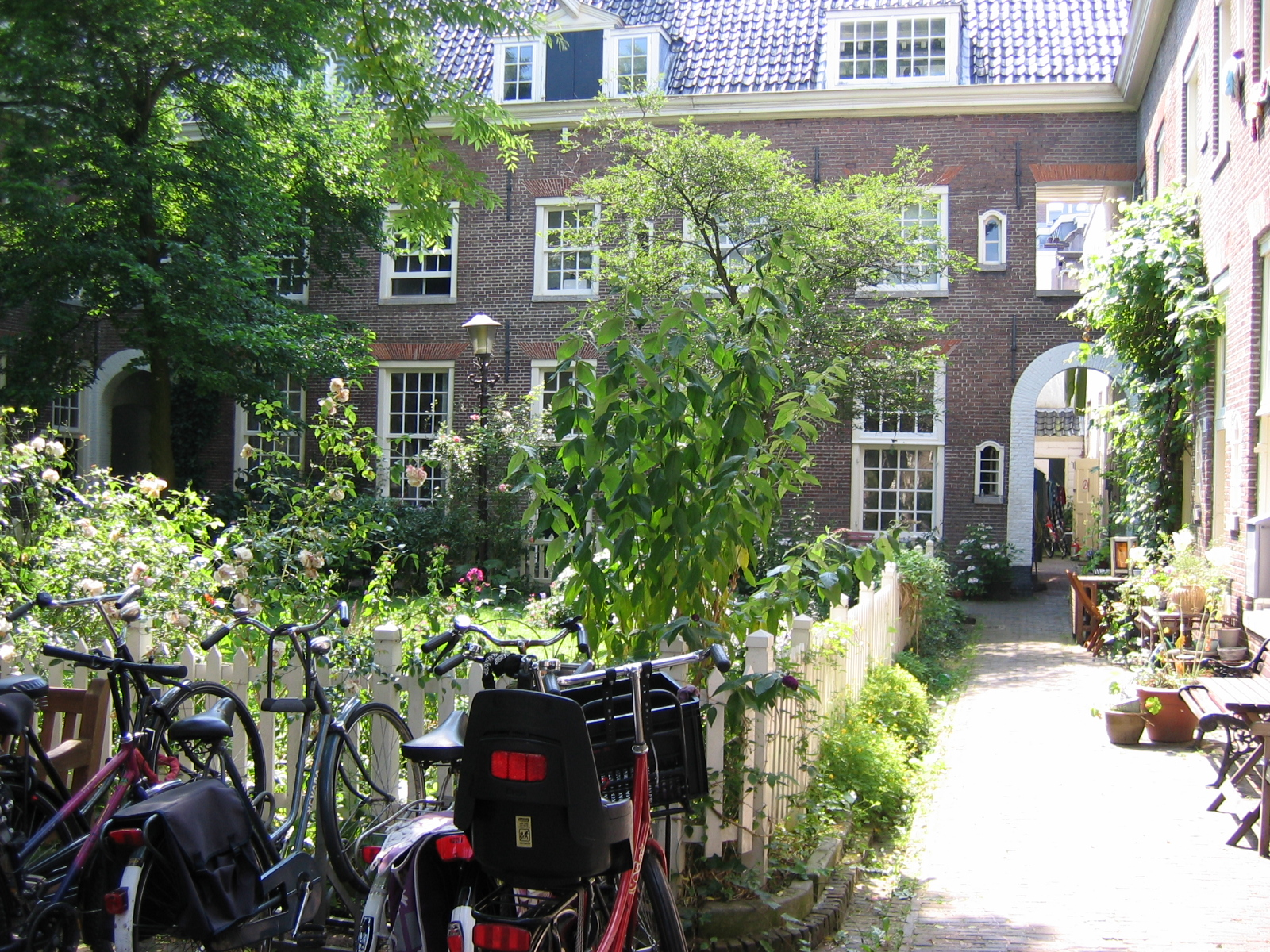 Huiszittenweduwenhof, bestaande uit vier vleugels om een binnenplaats, sobere klassicistische architectuur van Daniel Stalpaert (1650), met frontons boven de middenrisalieten aan straat- en binnenplaatszijde. Twee pompen met koepeldaken.